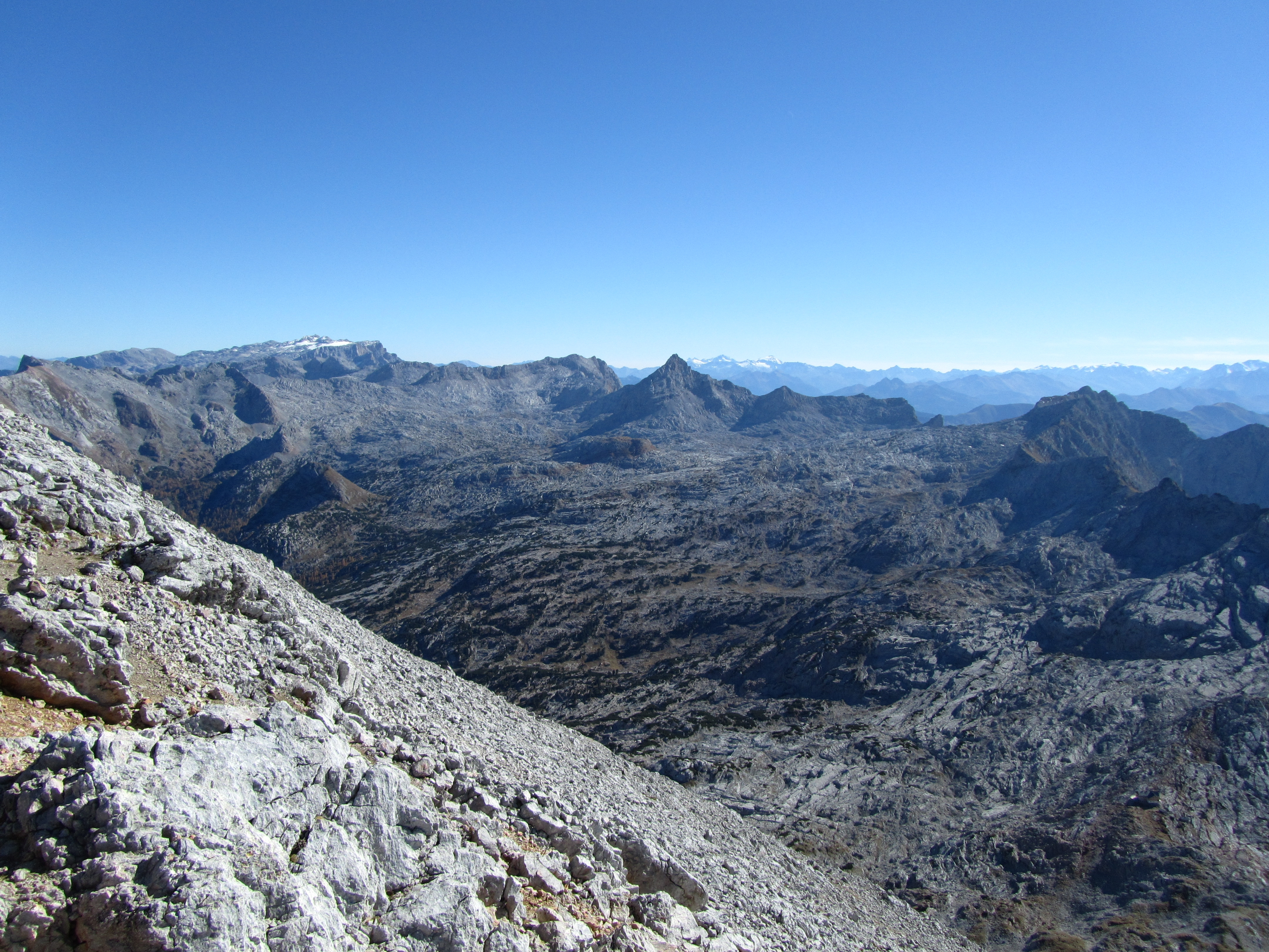 Blick nach Südosten über das Steinerne Meer vom Großen Hundstod (2593 m)